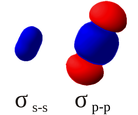 中文（台灣）: σ軌域的模型